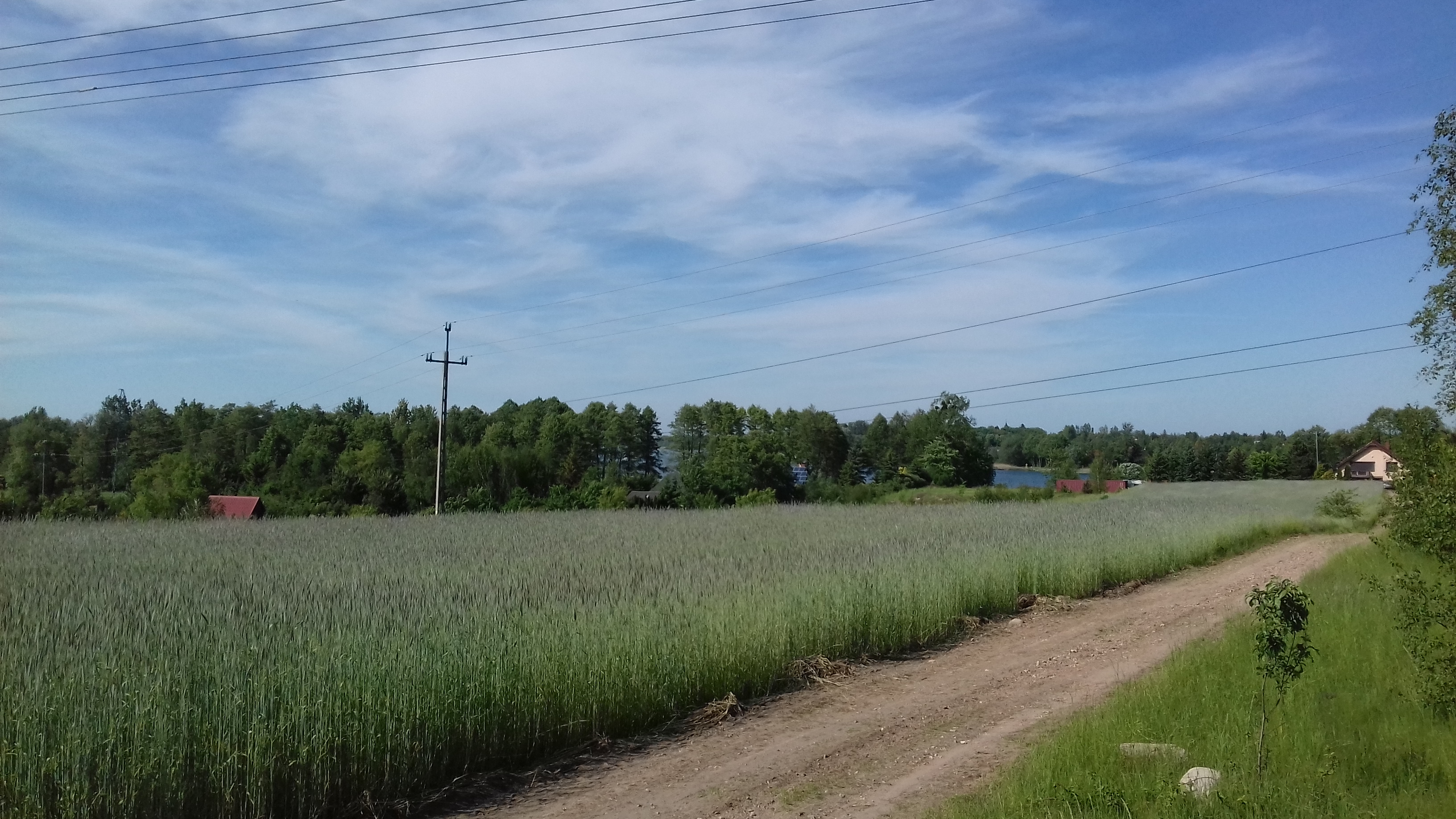 Jezioro Powidzkie w Kochowie